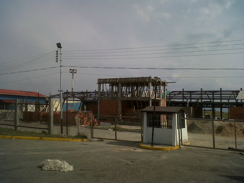 construccion aeropuerto nacional Florencio Gomez